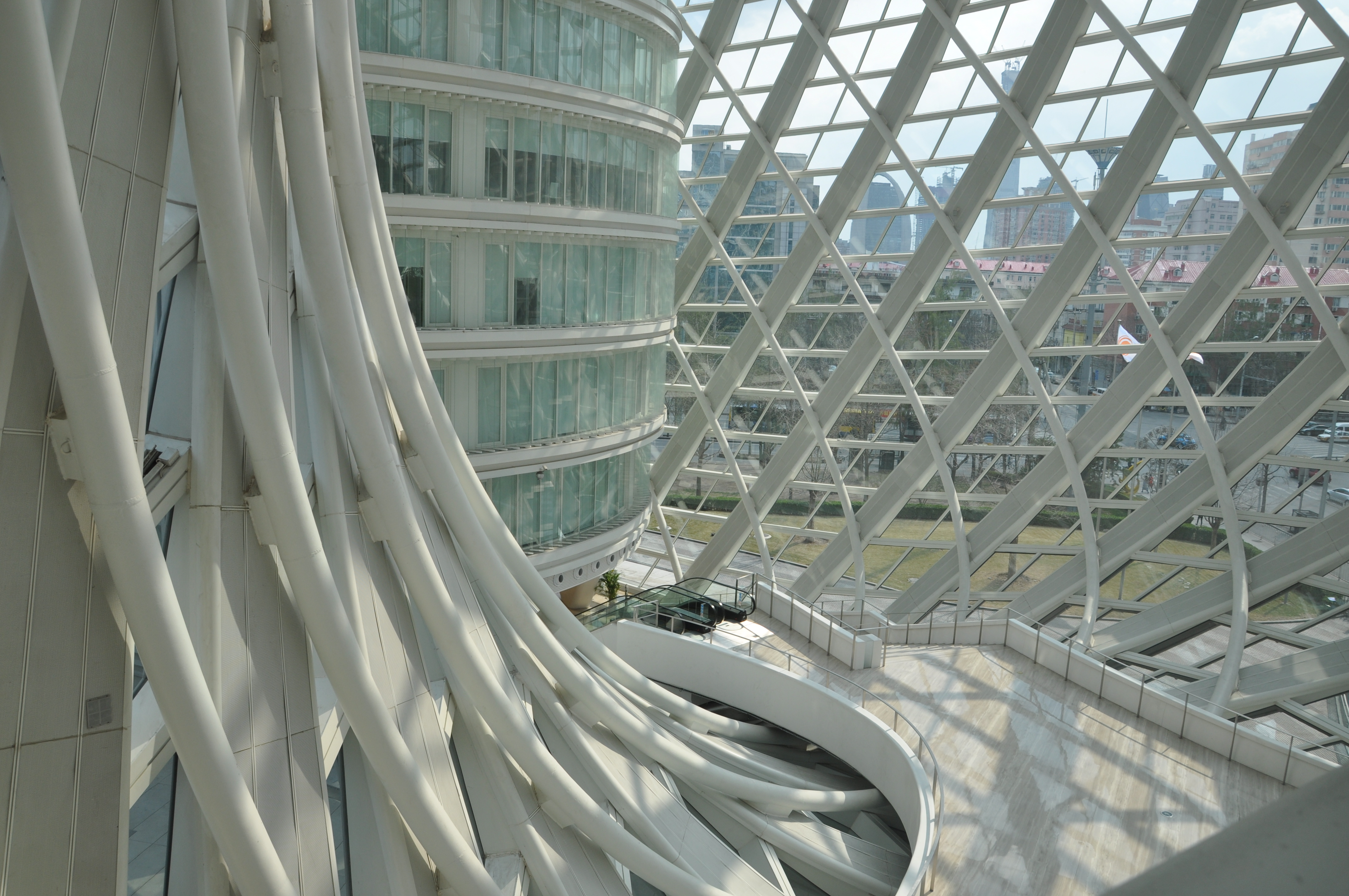 的西中庭地面、南楼西立面。在阳光照射下可以比较清晰地看到表皮的构造。